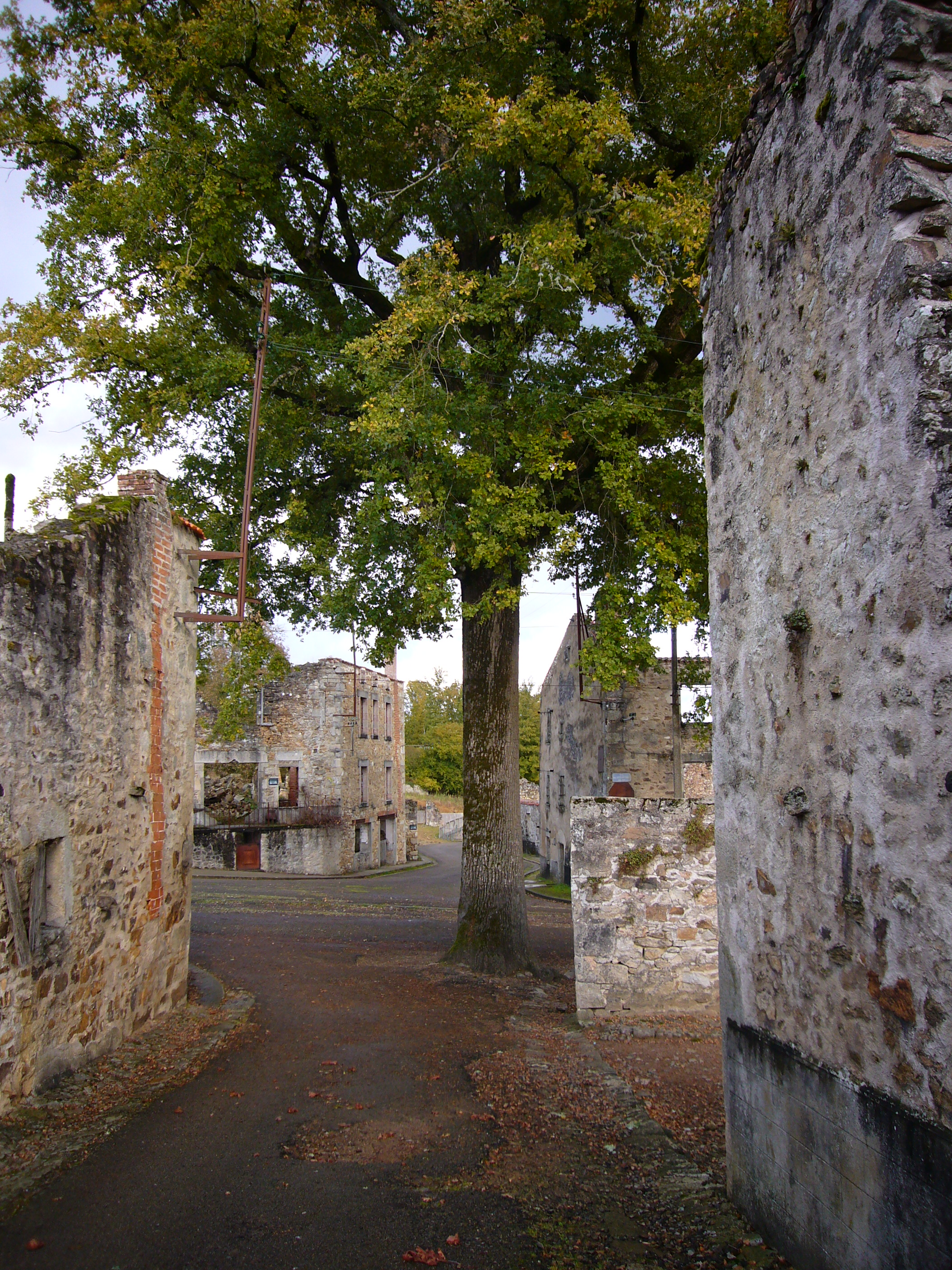 Arbre de la liberté, village martyr d'Oradour-sur-Glane (Haute-Vienne, France).